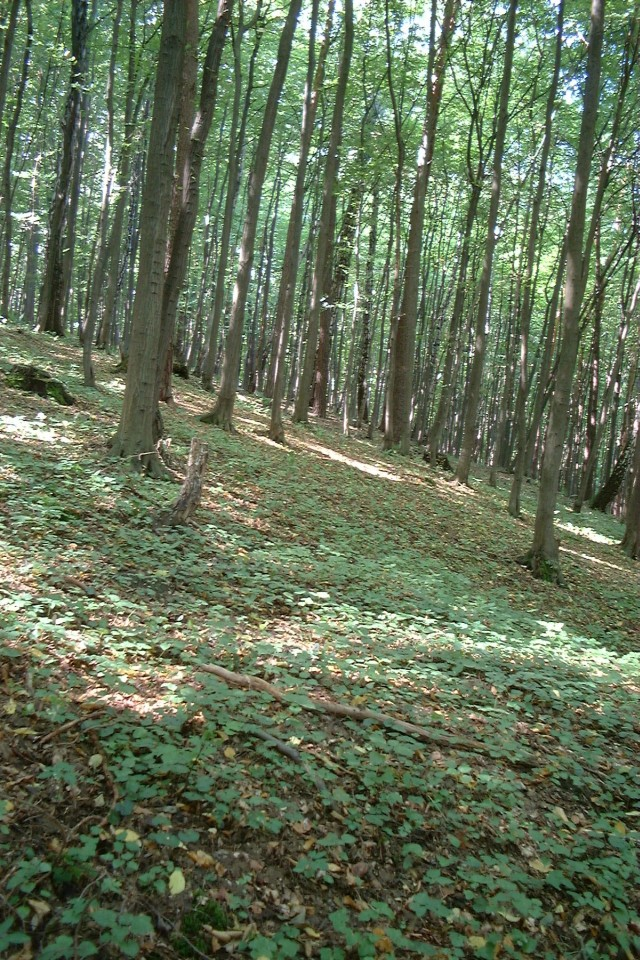 Poland, nature reserve "Ostreznik".